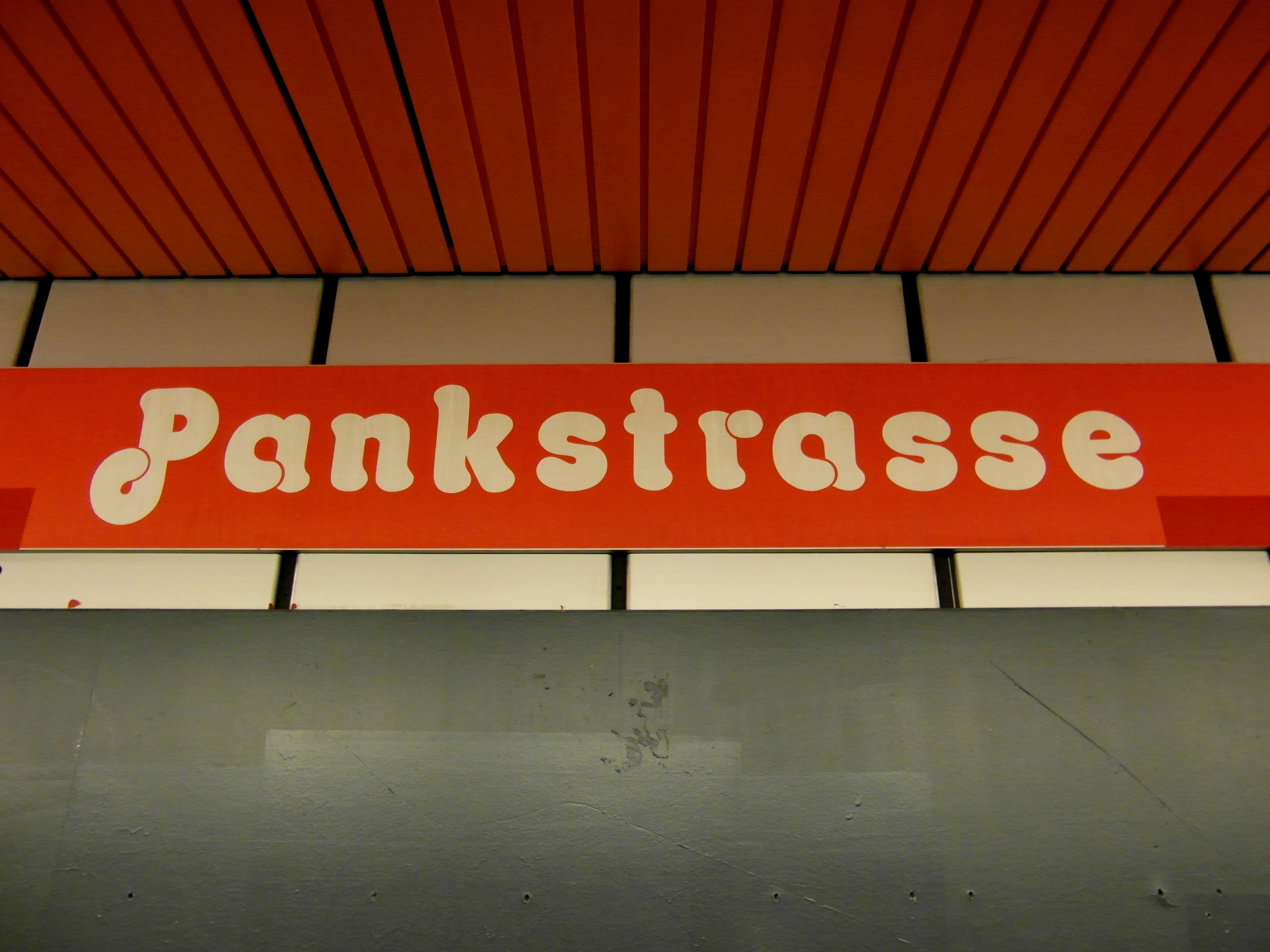 Auf dem Bahnsteig